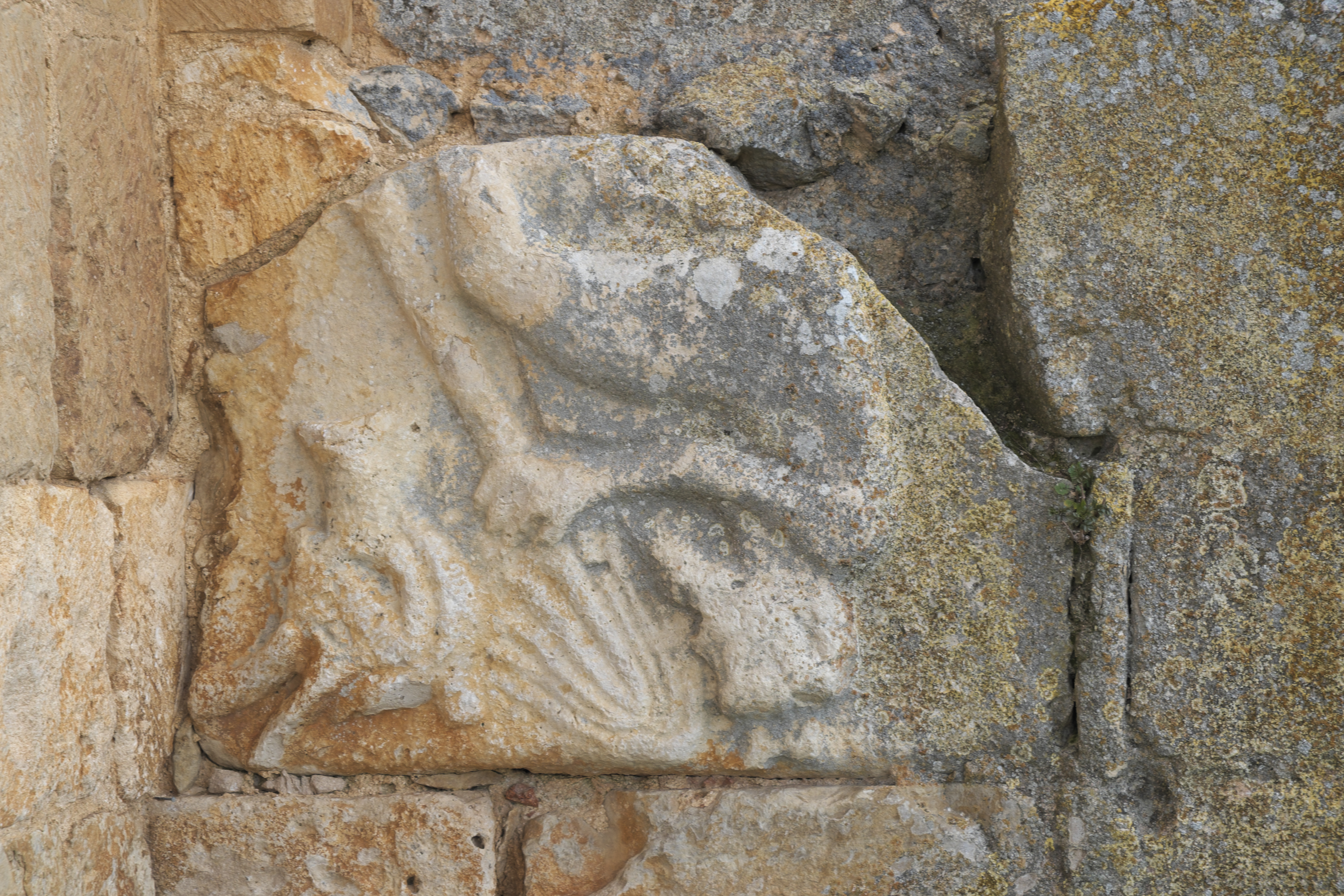 Ermita del Santo Cristo de San Sebastián in Coruña del Conde in der Provinz Burgos ((Kastilien-León/Spanien), Spolie